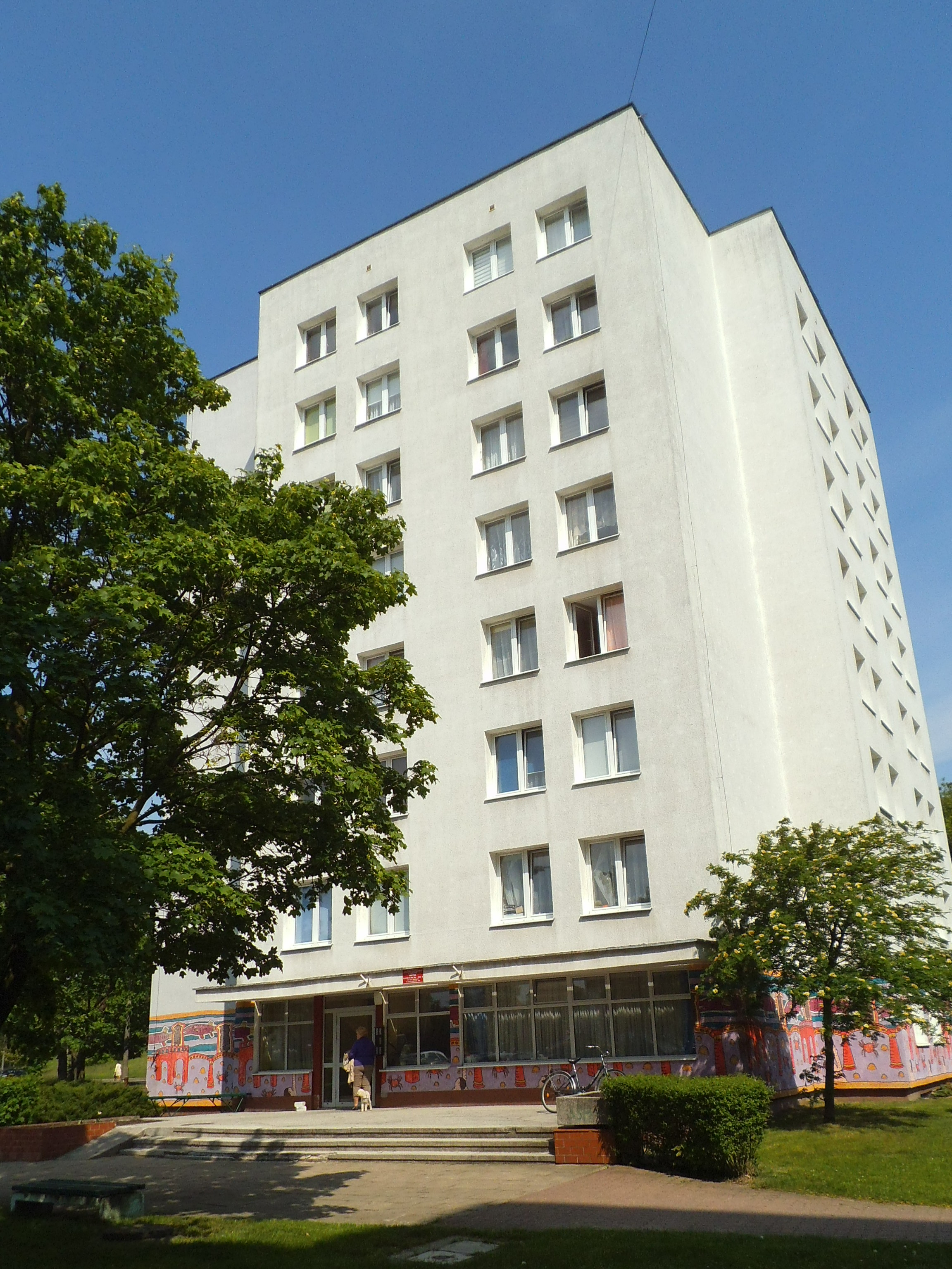 Hotel Asystencki nr 2 Uniwersytetu Mikołaja Kopernika w Toruniu